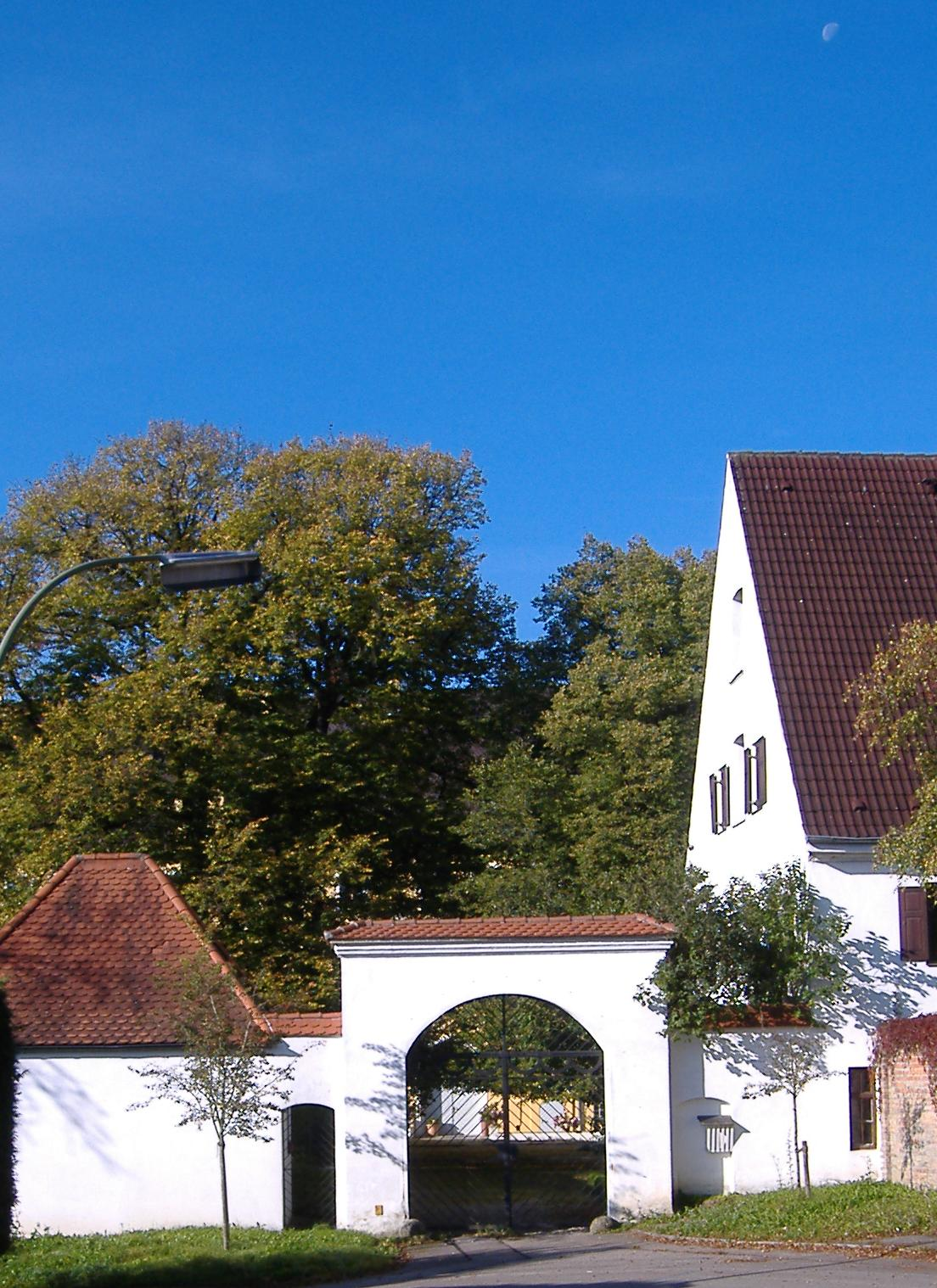 Aystetten